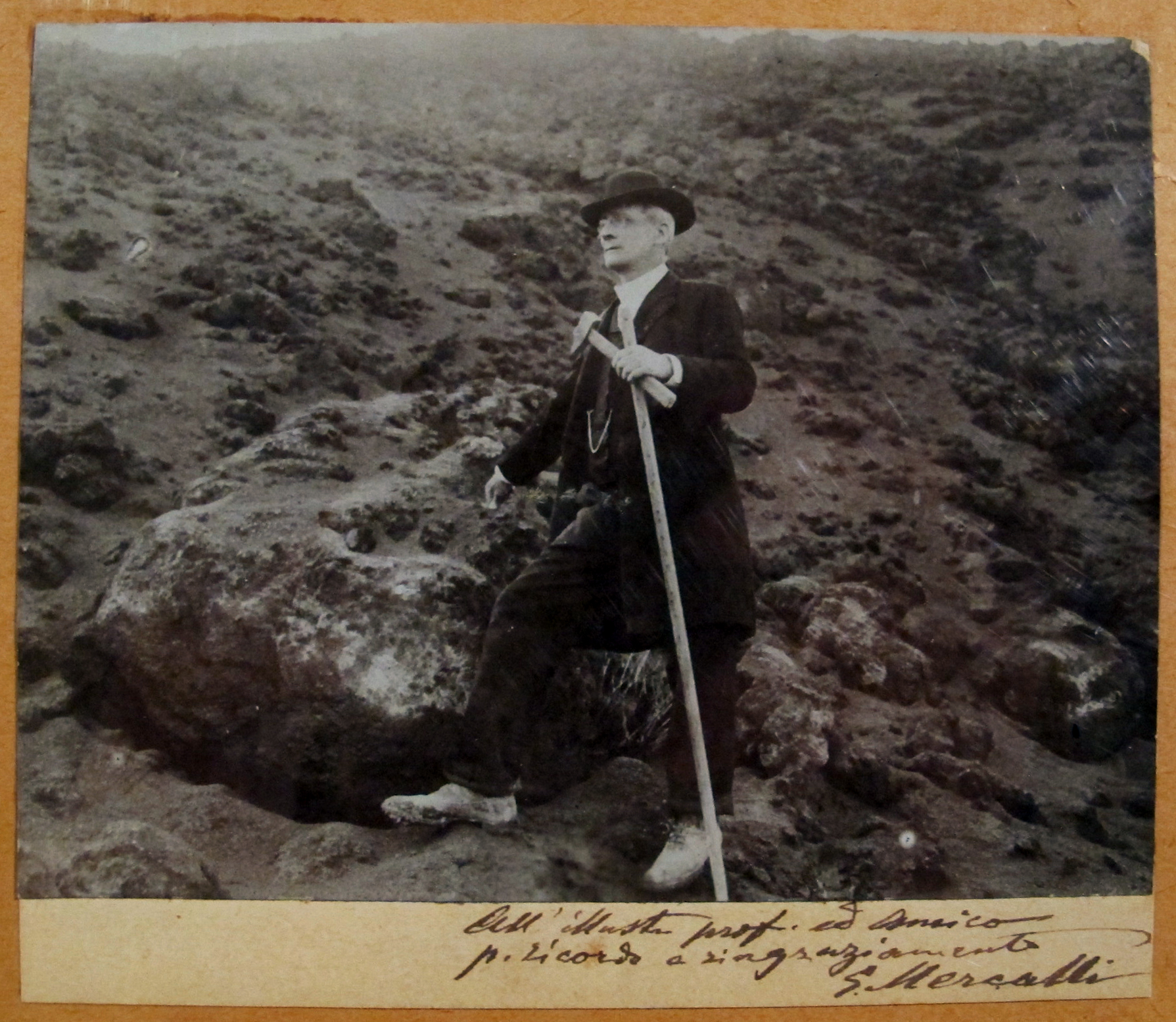 Osservatorio ximeniano, giuseppe mercalli sul vesuvio